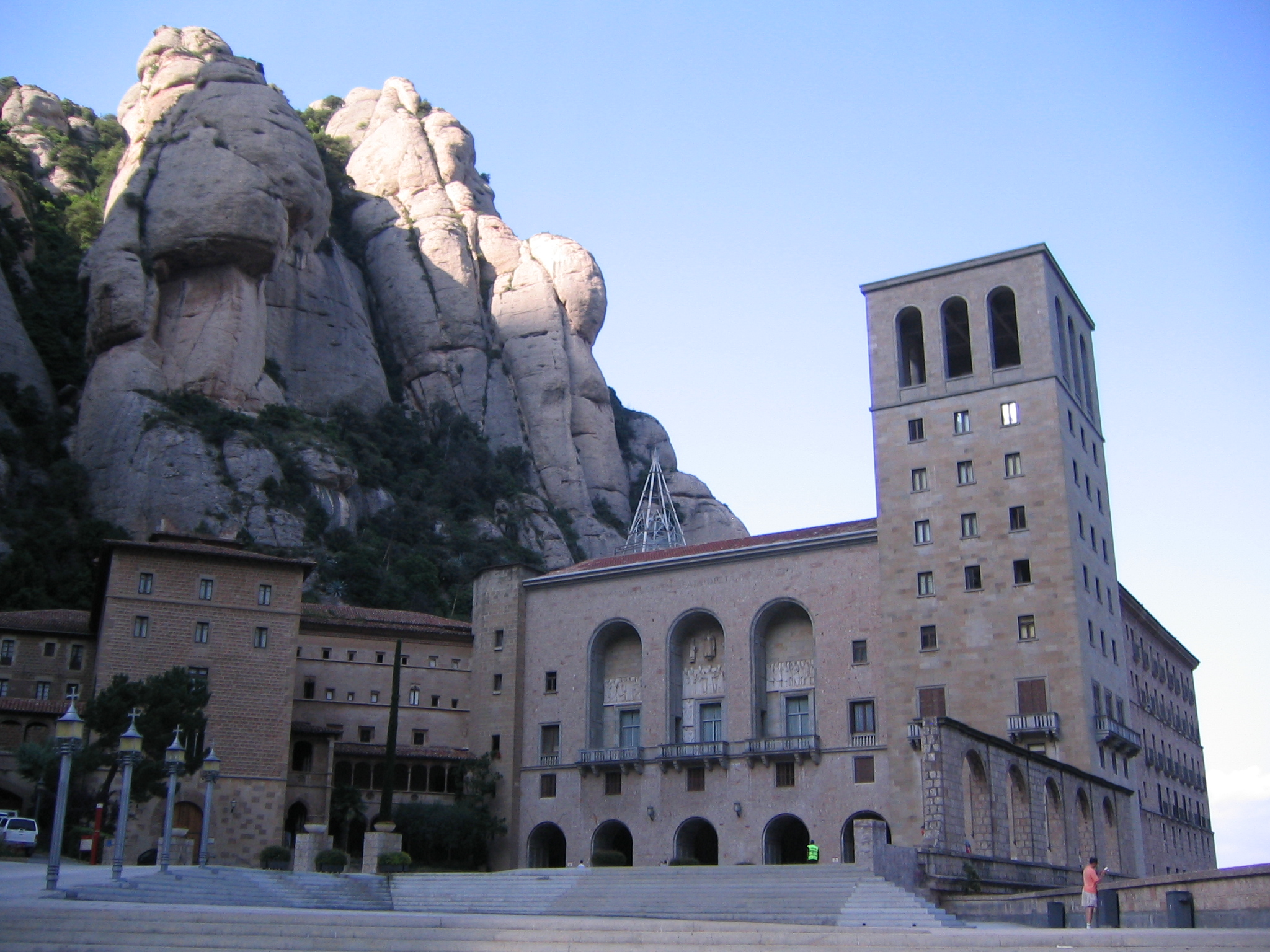 Monasterio de Montserrat en Barcelona.